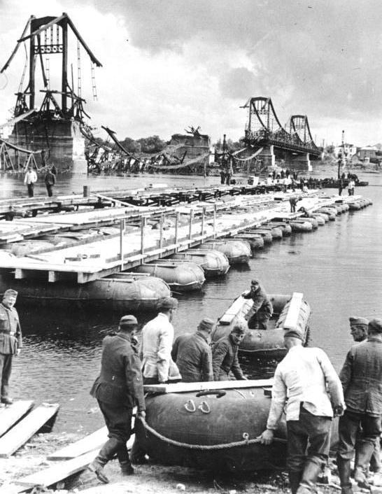 Scherl Die Sowjets hatten sämtliche Uebergänge über den Dnjepr bei Kiew gesprengt. Innerhalb 24 Stunden wurden von unseren Pionieren jedoch neue behelfsmäßige Übergänge hergerichtet. PK-Aufnahme: Kriegsberichter Mittelstaedt 8.10.41 [Herausgabedatum] Information added by Wikimedia users.English (rough translation of original Nazi caption): Kiev. Pioneers building pontoon bridges. The Soviets had blown all crossings of the Dnepr River at Kiev. In less than 24 hours, our pioneers threw together temporary crossings.